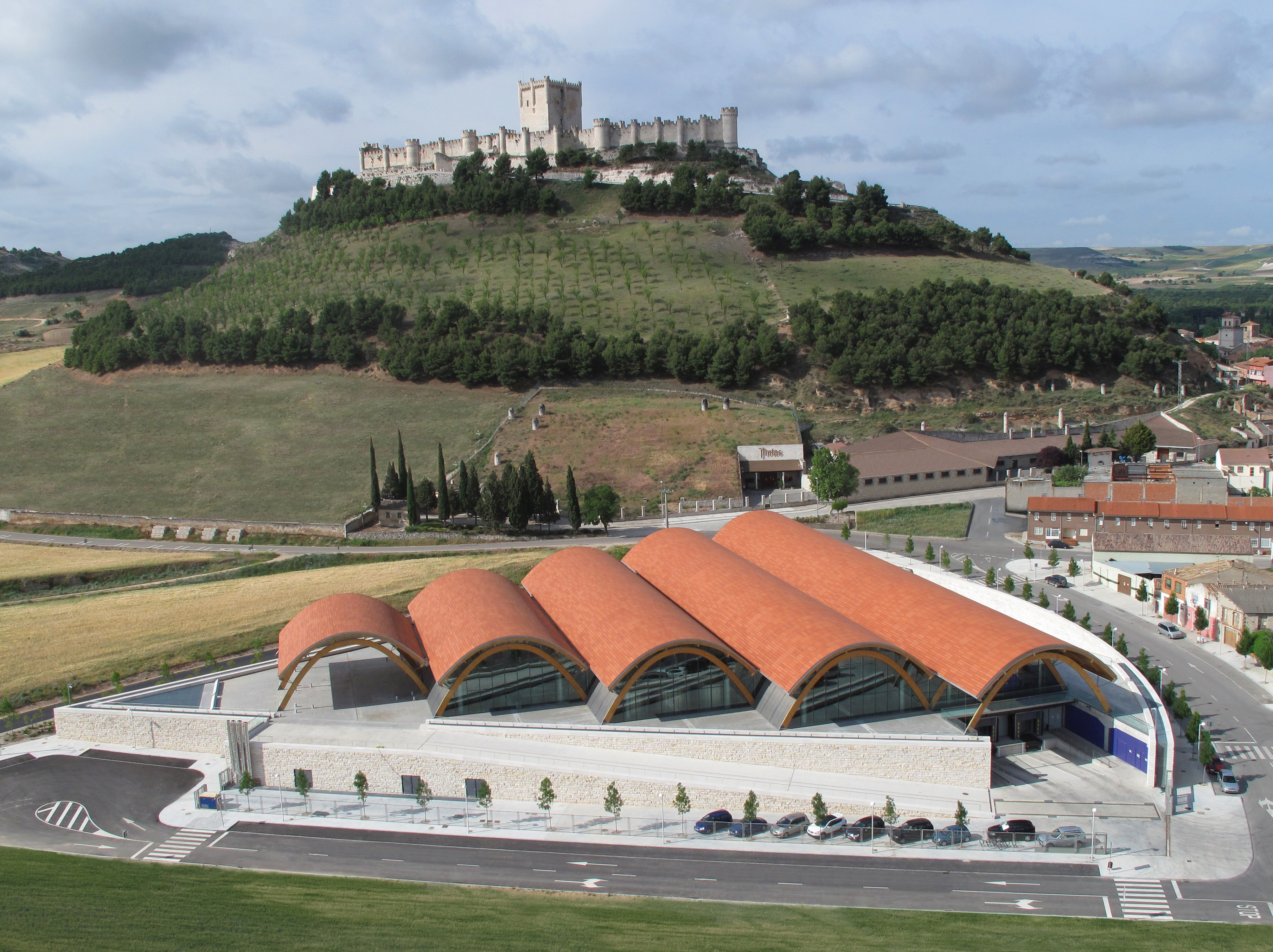 Vista panorámica de la bodega diseñada por Richard Rogers con el Castillo de Peñafiel al fondo.